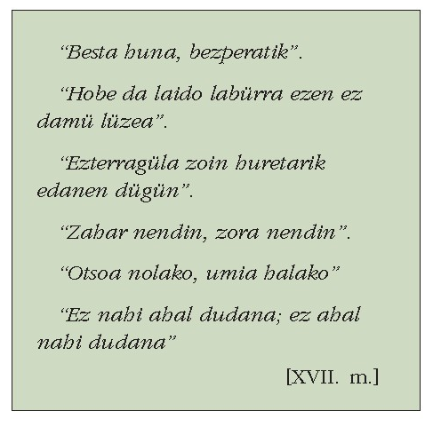 Jakes Belak bildutako zenbait esaera zahar.